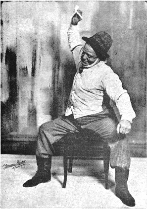 Damase DuBuisson, folkloriste